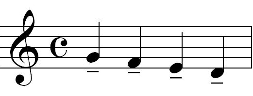 Tenuto